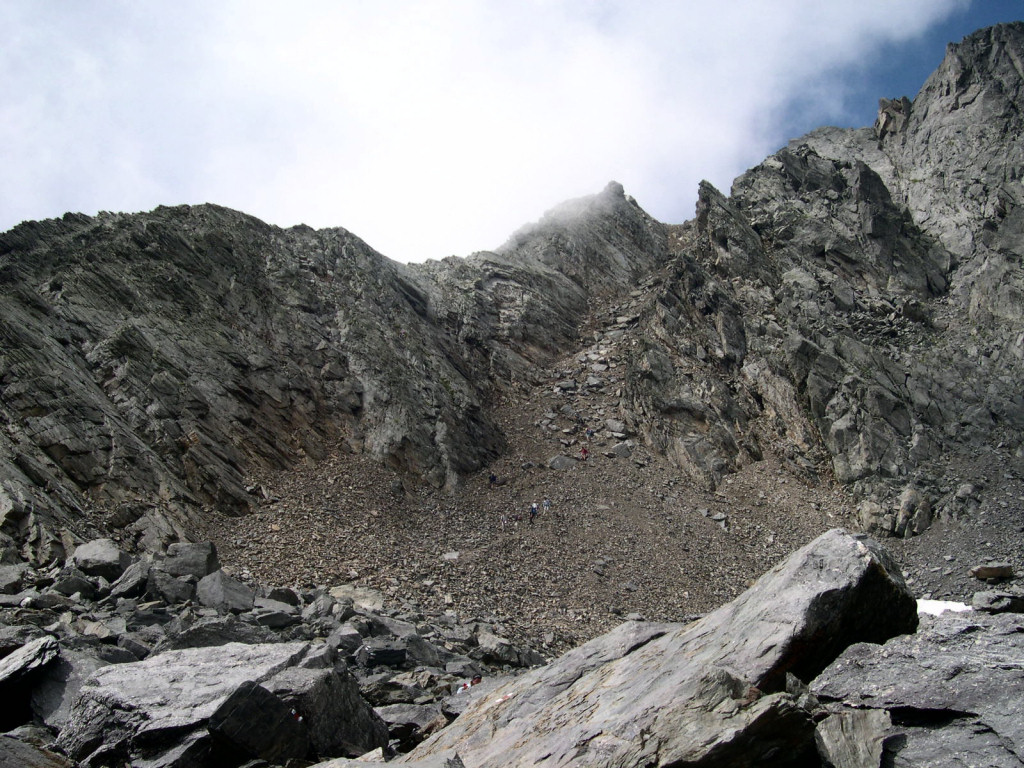 Discesa da Ol Simal verso la Valle del Fosso sul Sentiero delle Orobie. Foto da me scattata e rilasciata sotto Creative Commons.